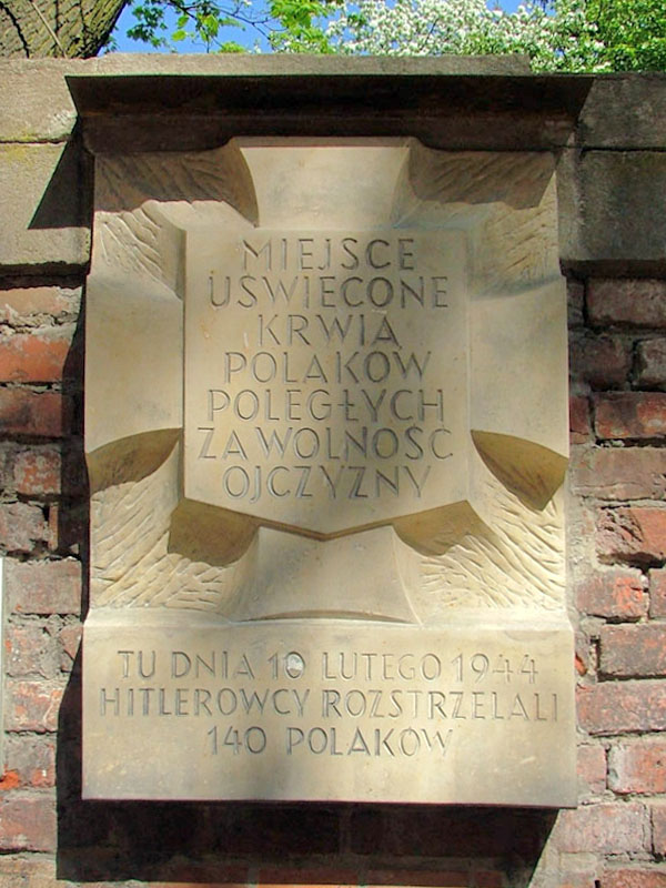 Warszawa, ul. Barska, tablica pamiątkowa - "Miejsce uświęcone krwią Polaków poległych za wolność Ojczyzny. Tu dnia 10 lutego 1944 hitlerowcy rozstrzelali 140 Polaków".